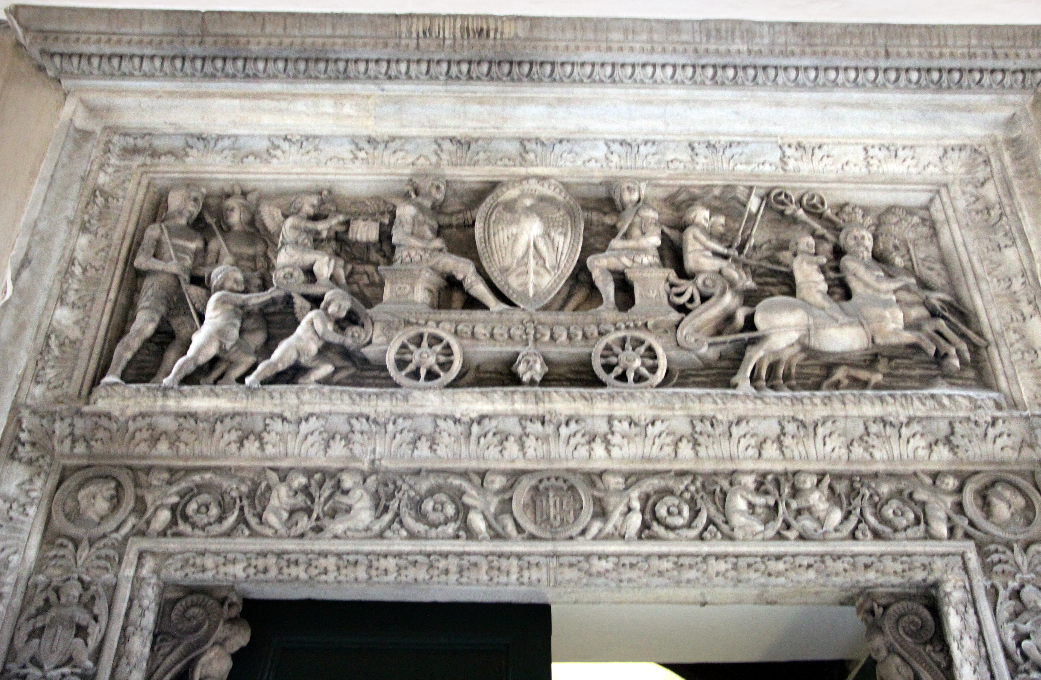 Genova, varie